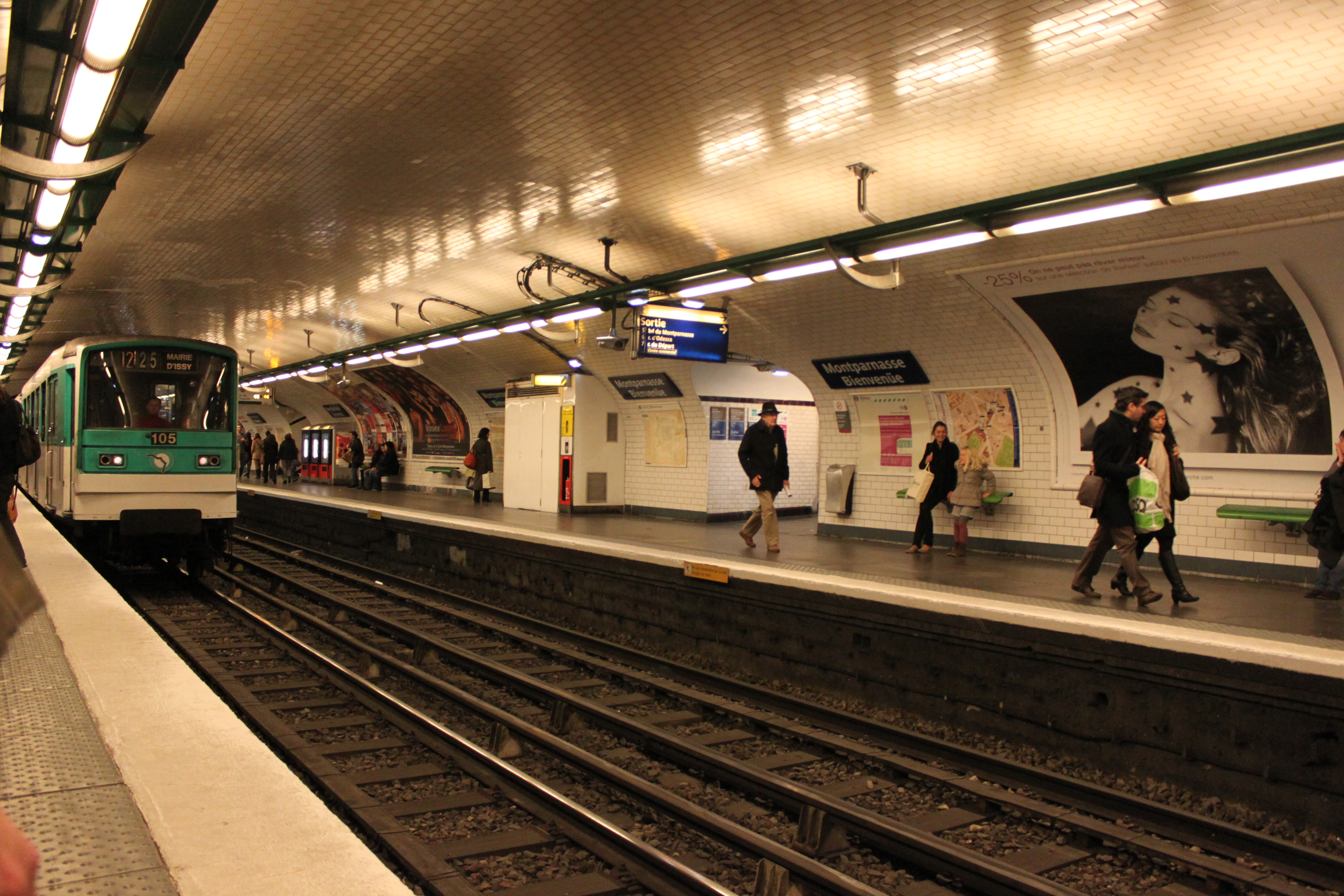 La station Montparnasse sur la ligne 12 du métro de Paris.